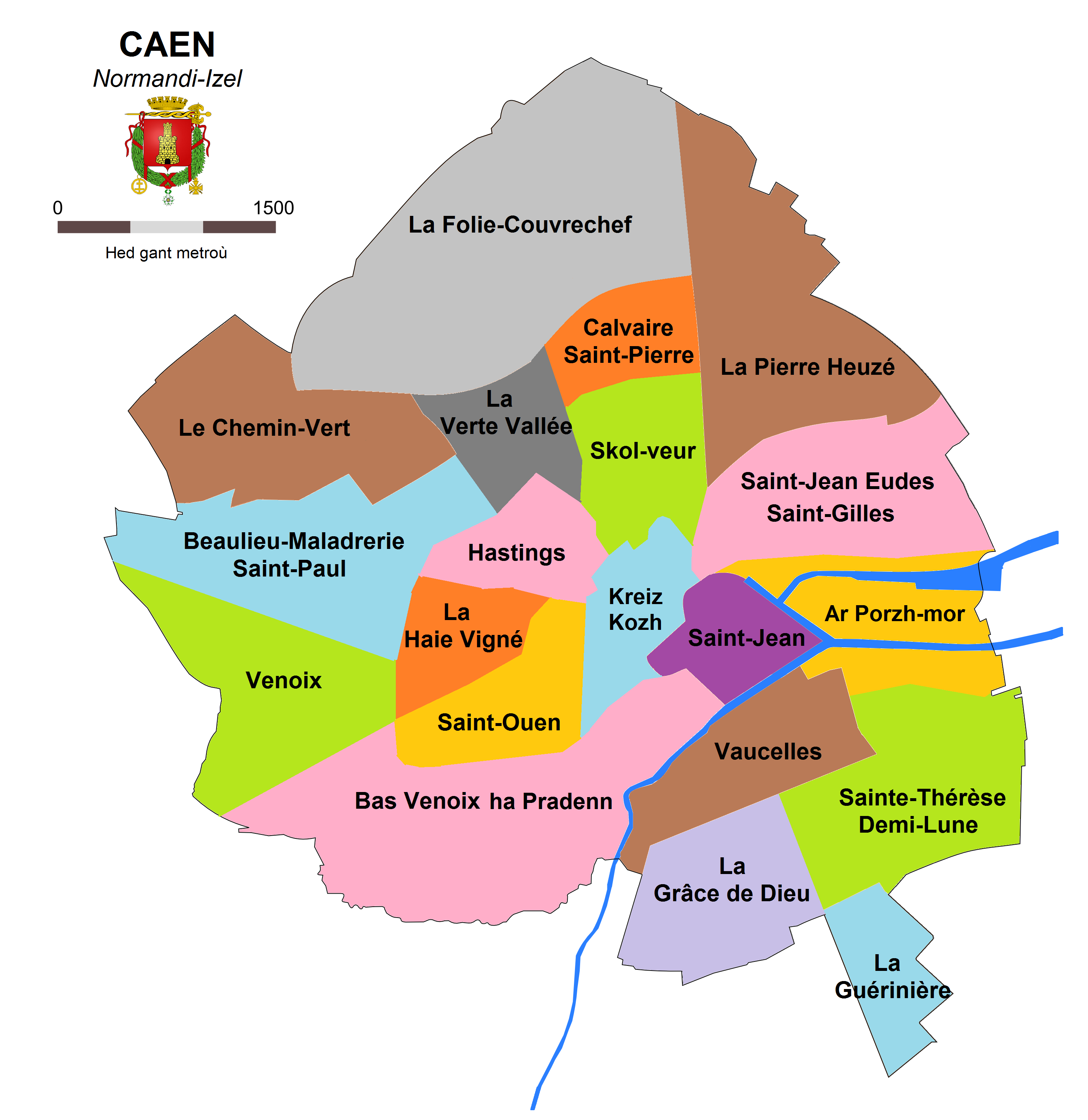 Kartenn karterioù Caen